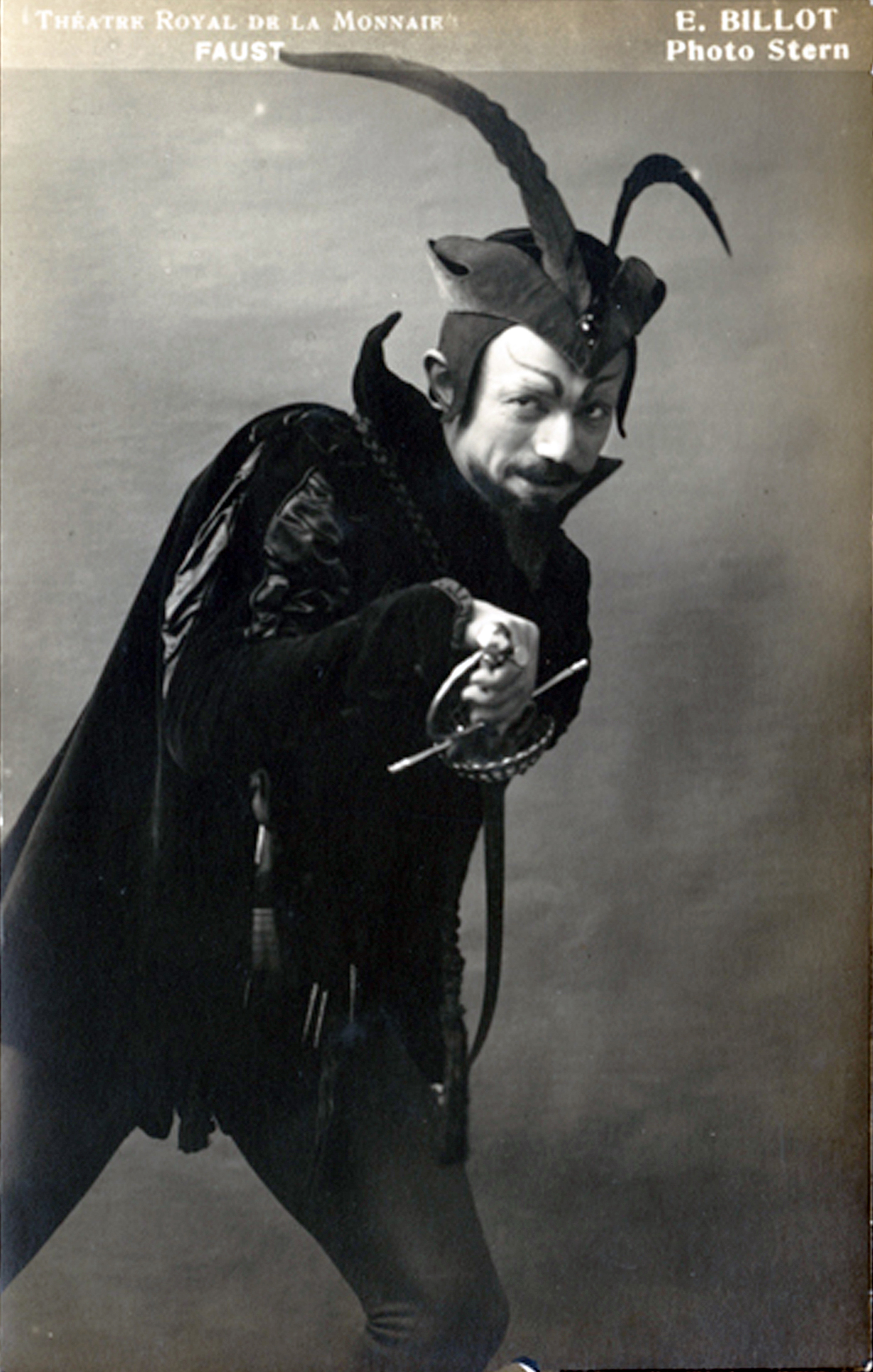 Portrait d'artiste du baryton Etienne Billot